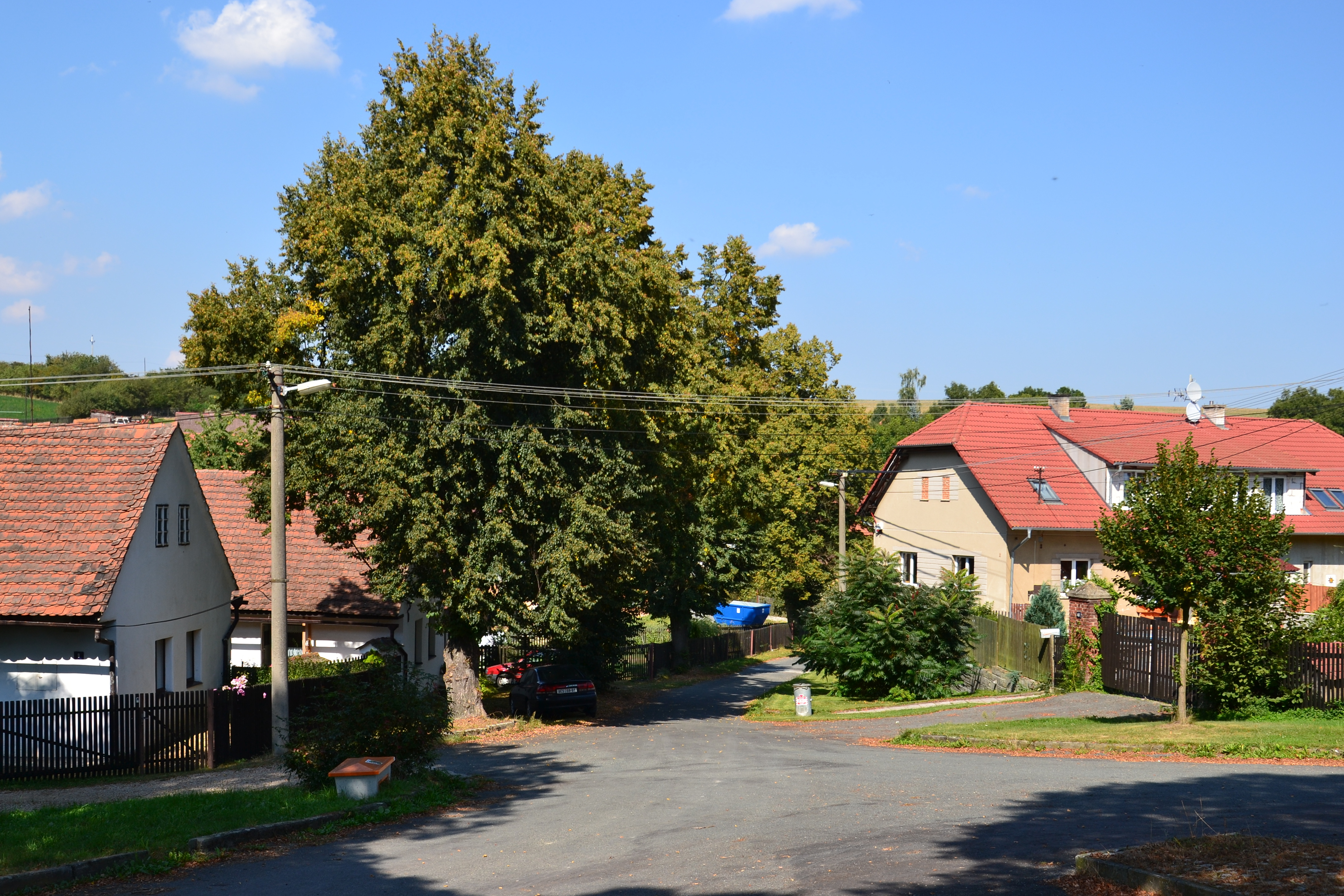 Náves